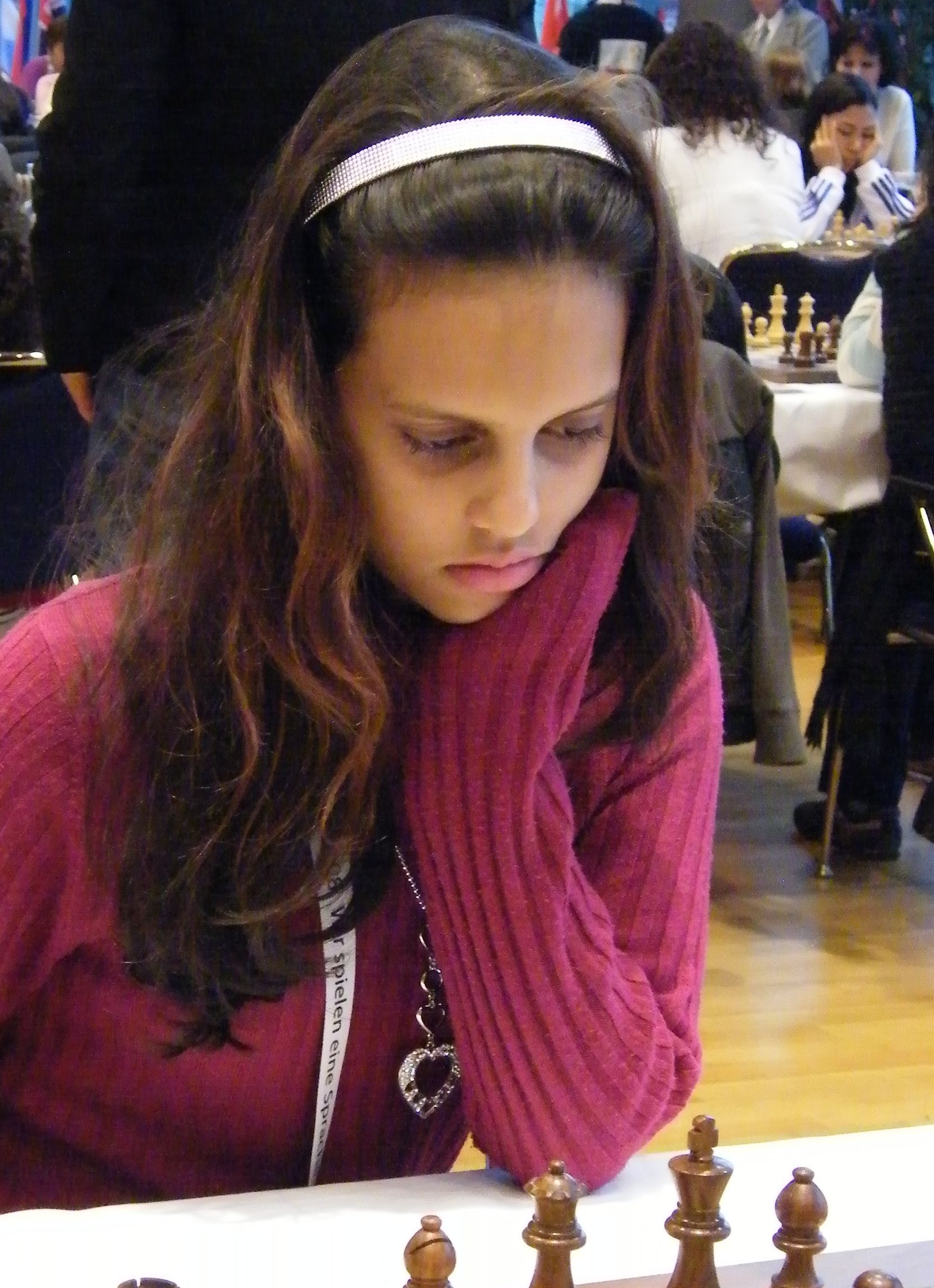 Kieran Lyons bei der 38. Schacholympiade in Dresden 2008